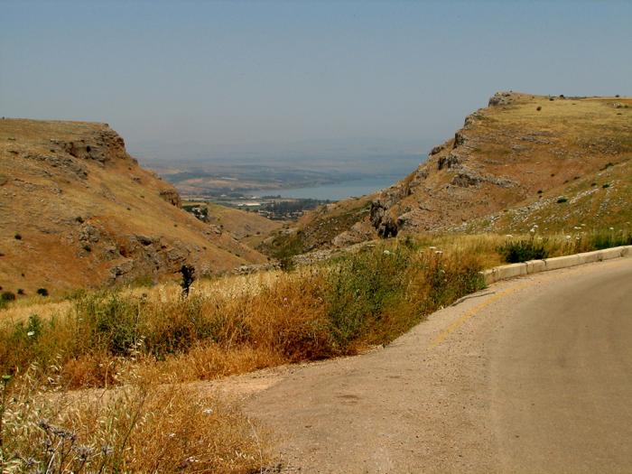 צוק הארבל, כשברקע ים כינרת.